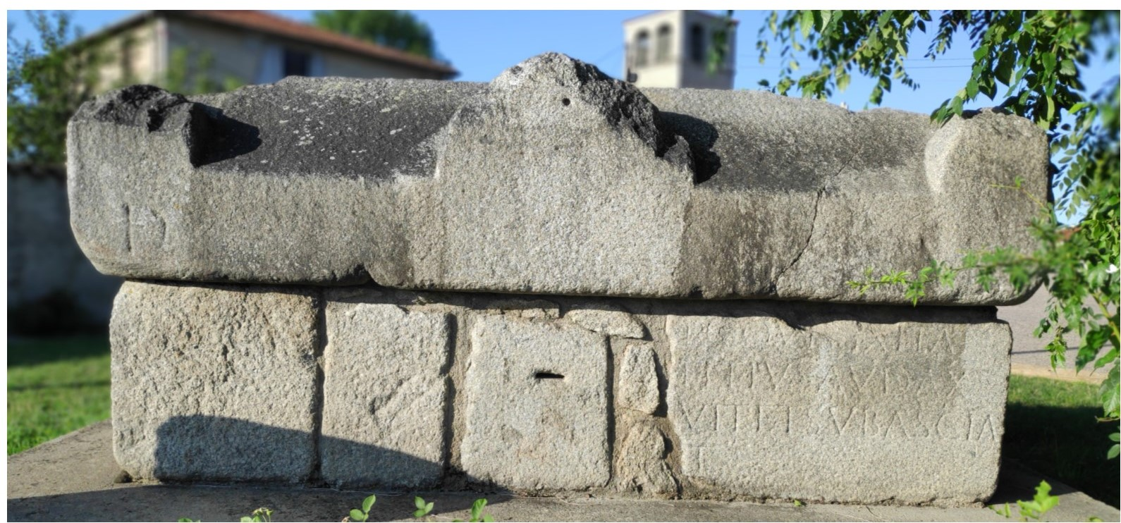 Sarcophage tel qu'il a été restauré en 1972 par Alain Robin , sur la base du dessin de l'abbé Rous en 1851